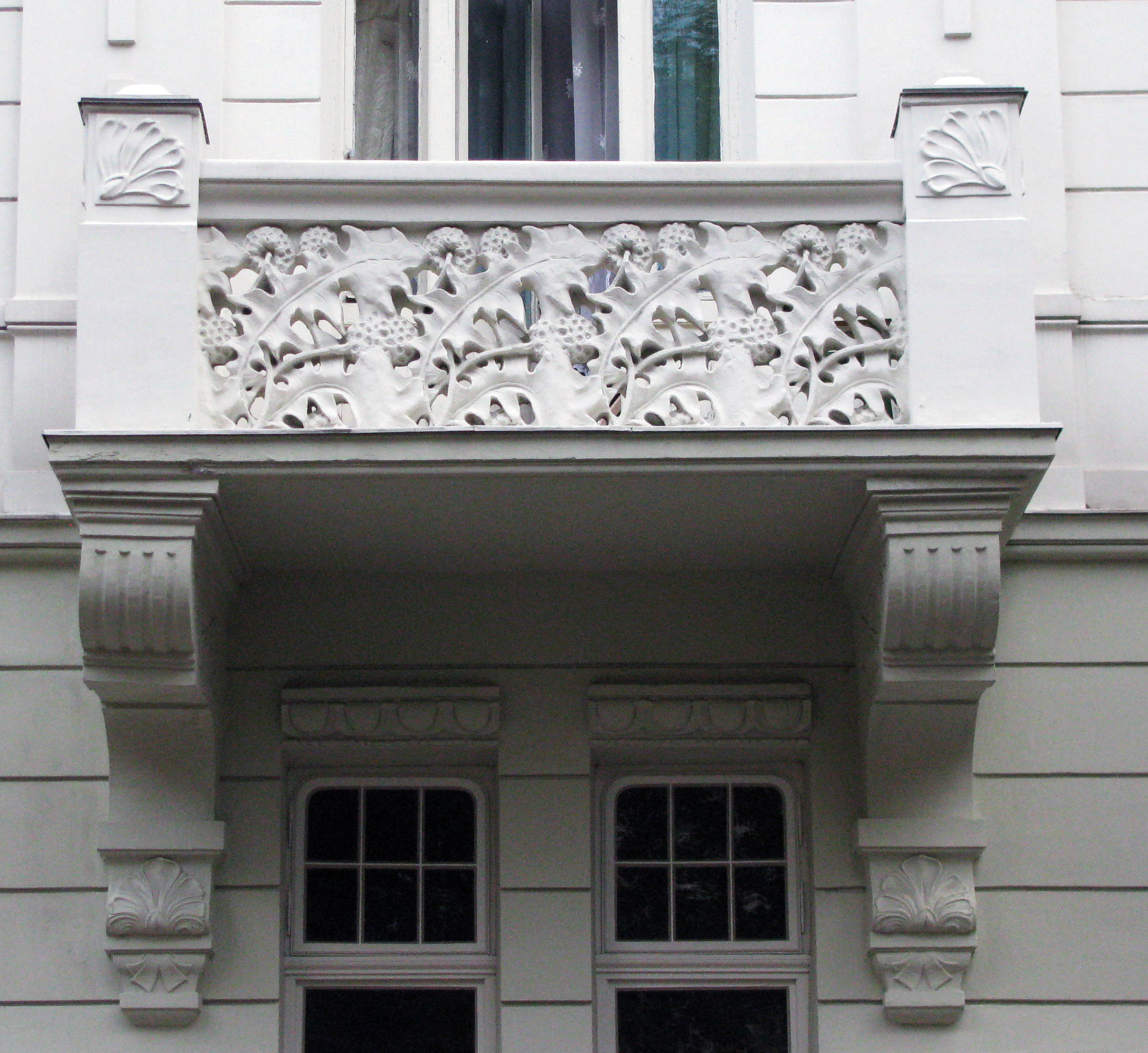 Будинок по вулиці Богомольця, 6 (Львів). Балкон. Запроектований архітектурно-будівничим бюро Івана Левинського.